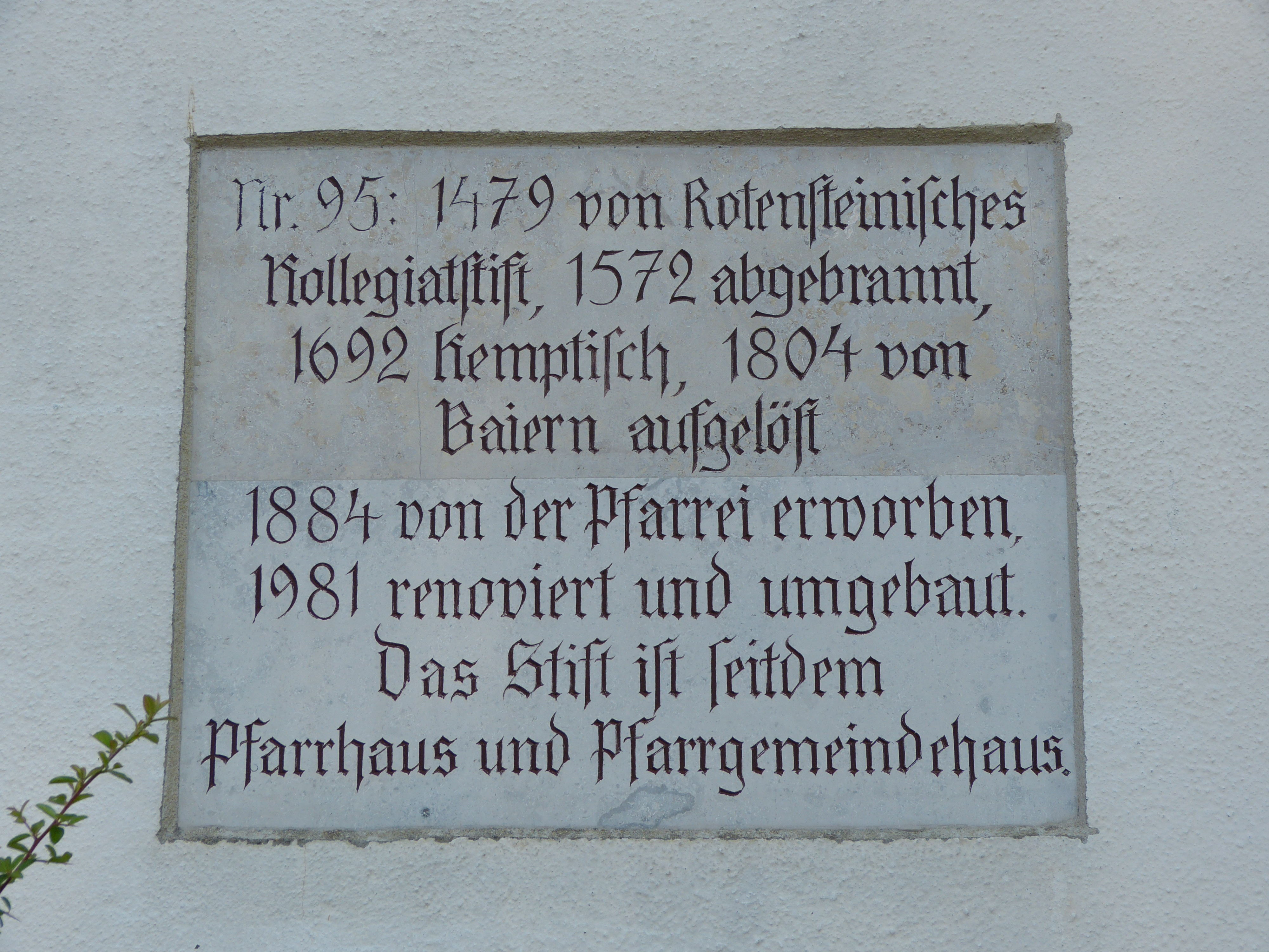 Kollegiatstift in Bad Grönenbach, Landkreis Unterallgäu, Bayern